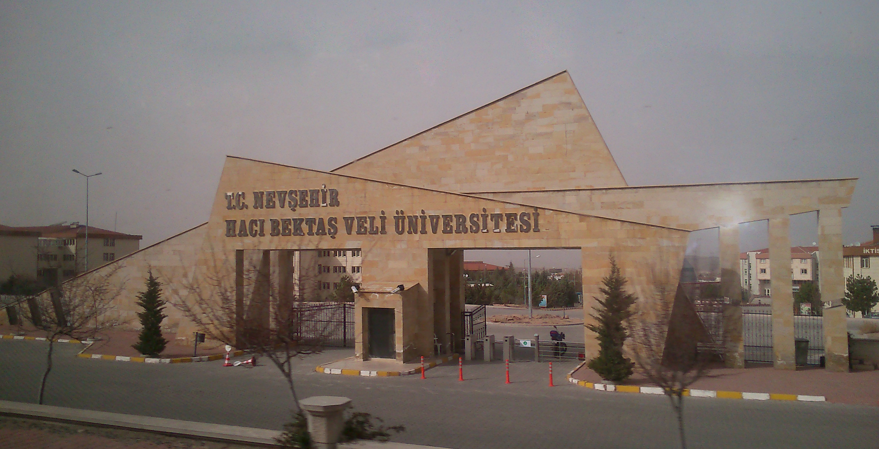 Nevşehir Hacı Bektaş Veli Üniversitesinin giriş kapısı.